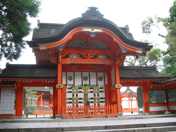 宇佐神宮西大門、Sugarless撮影 category:神社の画像